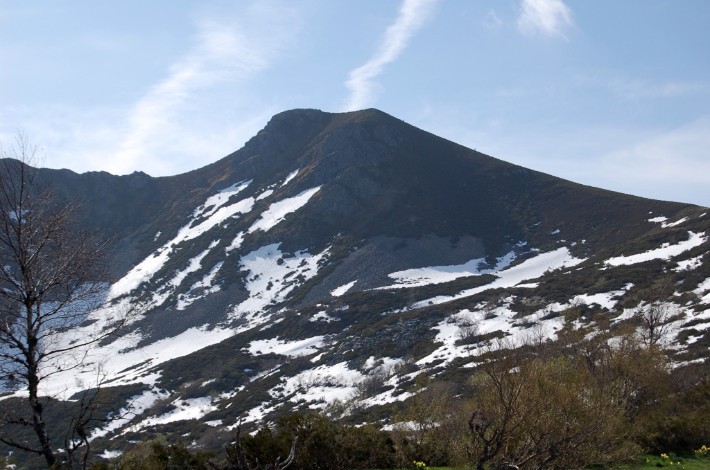 Ancares, degrada a Piornedo, Cervantes. Tres Bispos